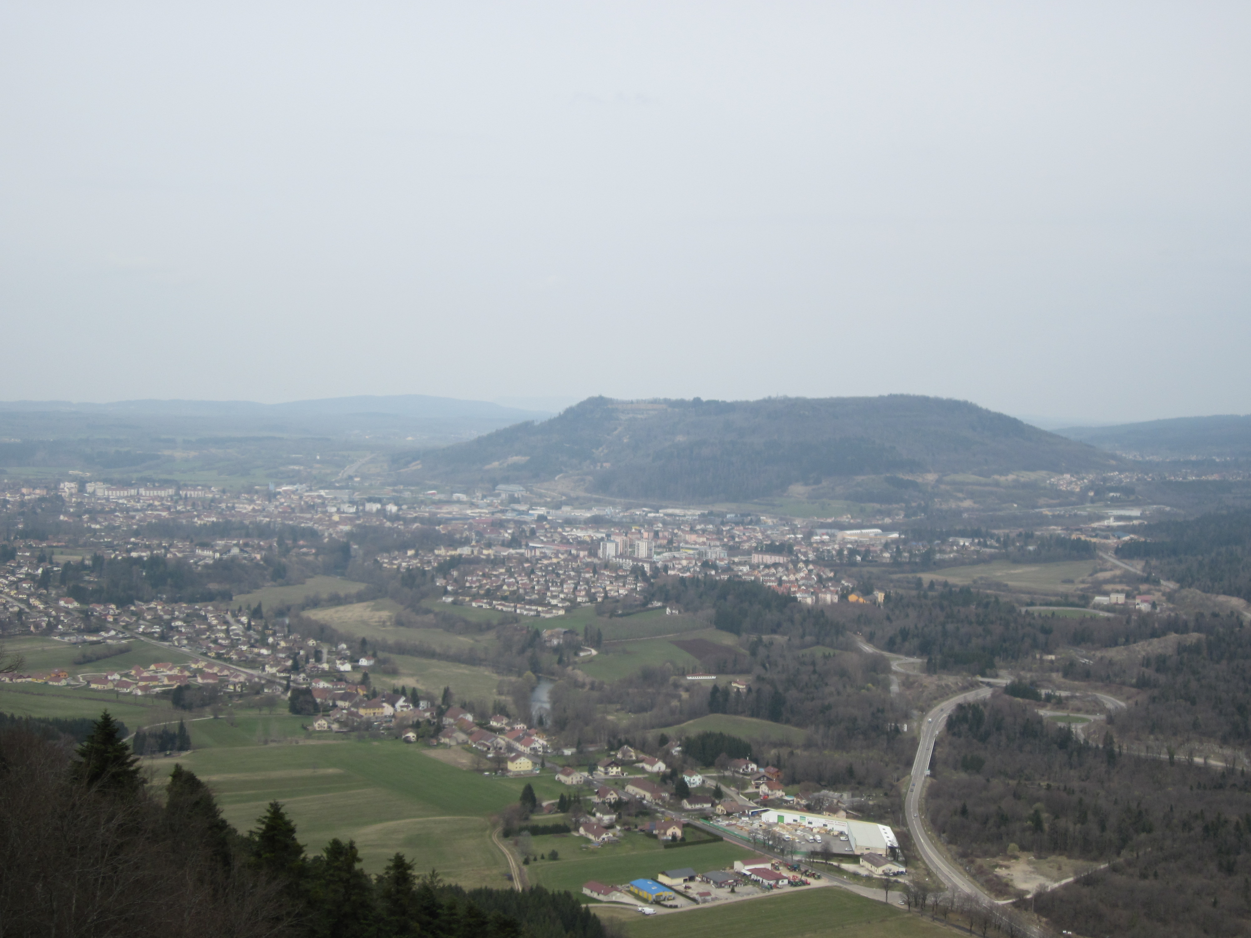 Paysage du Jura : Au premier plan le village de Cize, au 2e plan la ville de Champagnole, au 3e plan le Mont Rivel